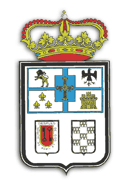 Escudo del concejo Asturiano de Laviana